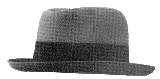 Hat, Felt Hat, Filzhut, reload